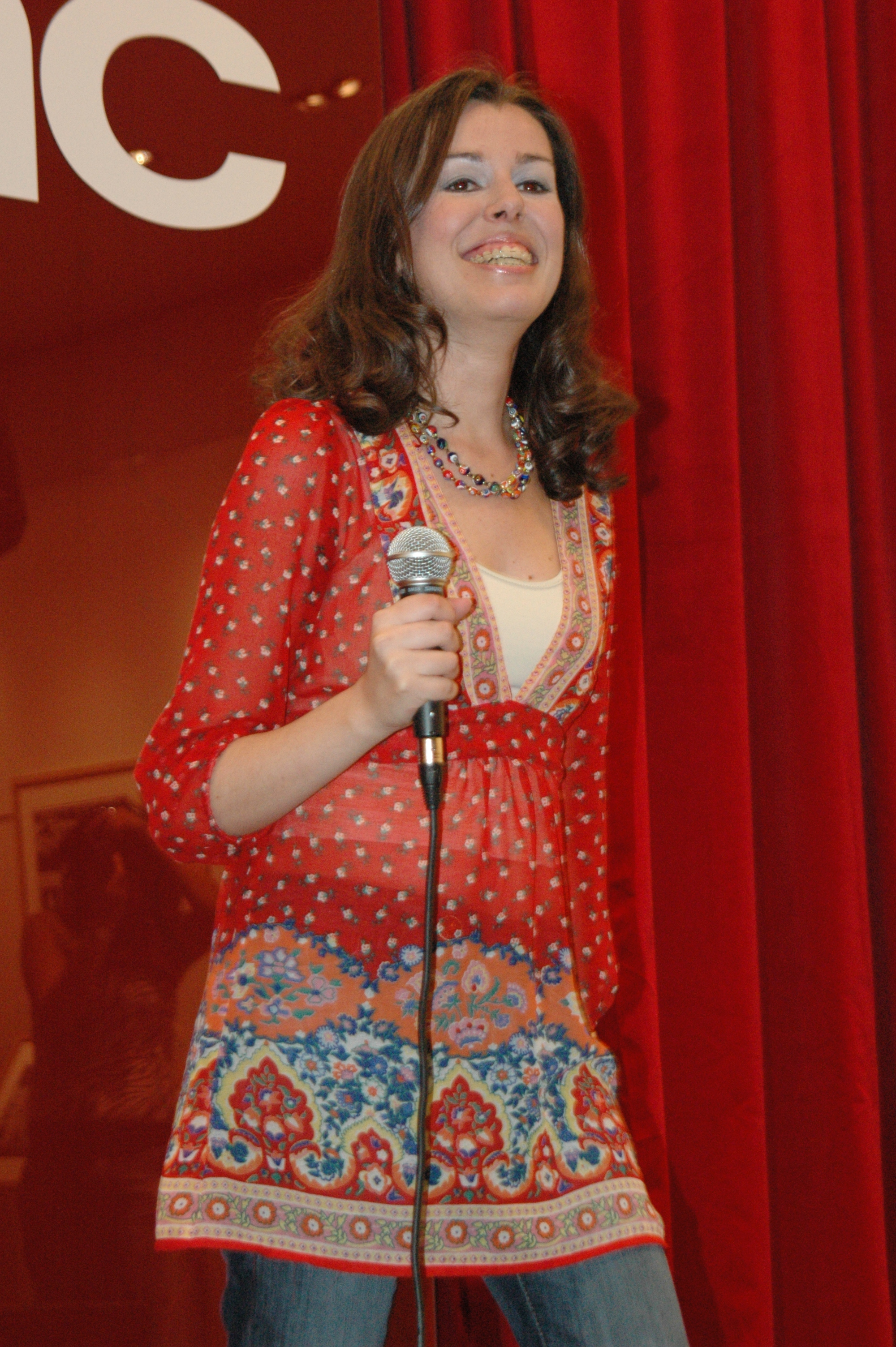 Carina Freitas na FNAC Madeira